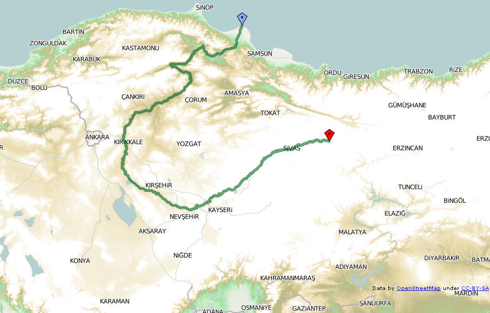 Kızılırmak Nehrinin Haritası